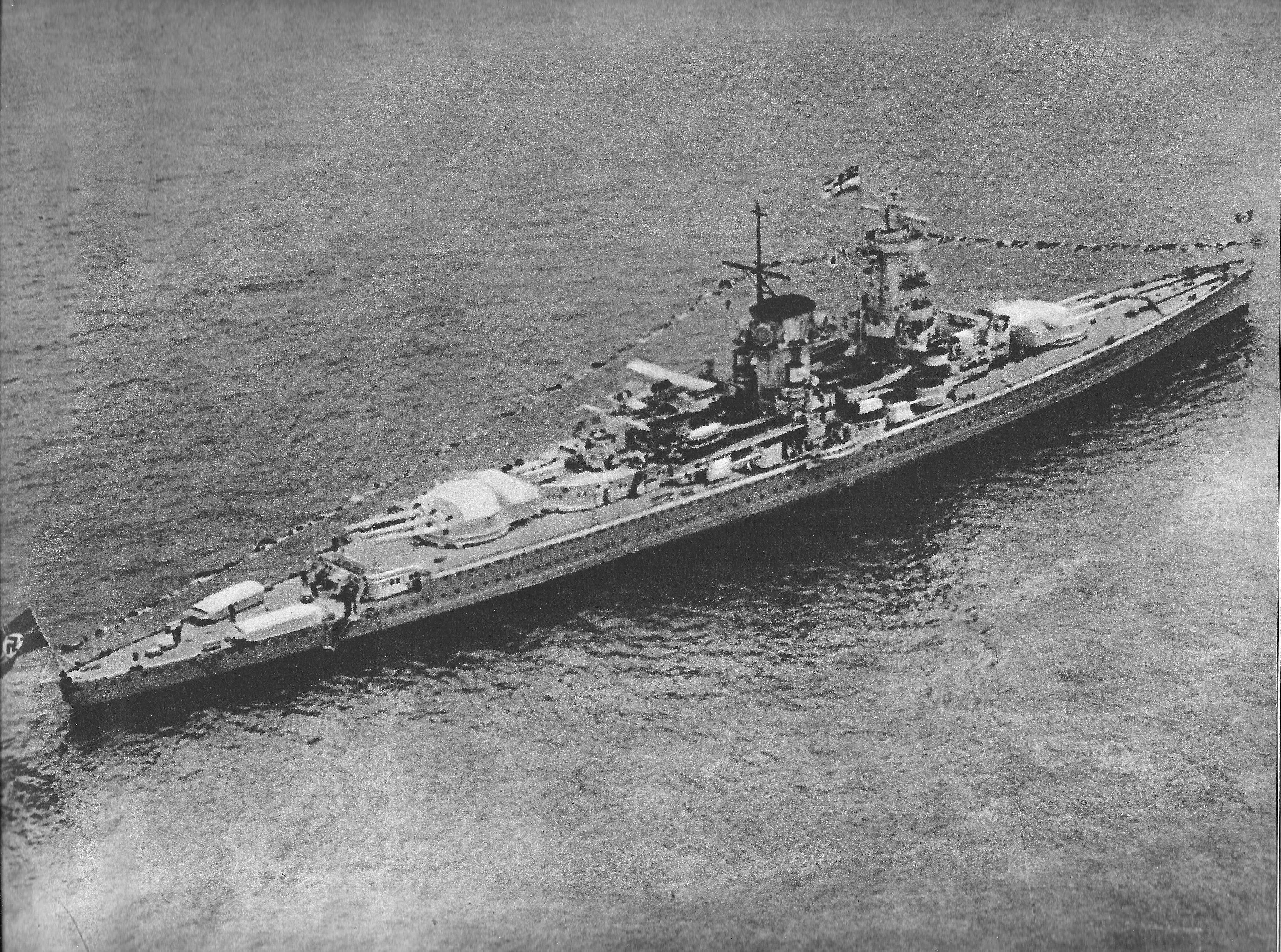 Admiral Graf Spee, à flot.